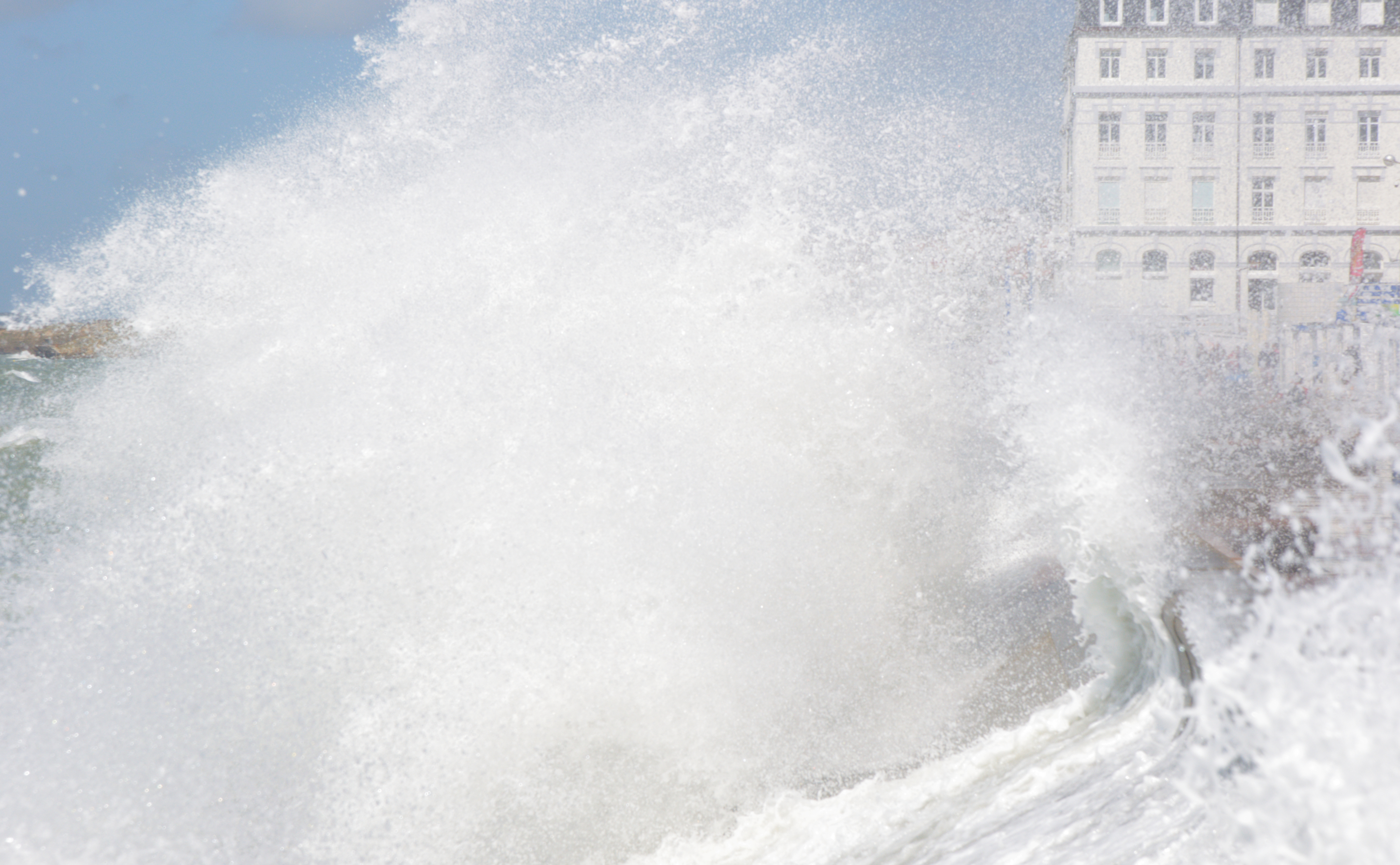 Vives-eaux à Wimereux, Nord-Pas-de-Calais